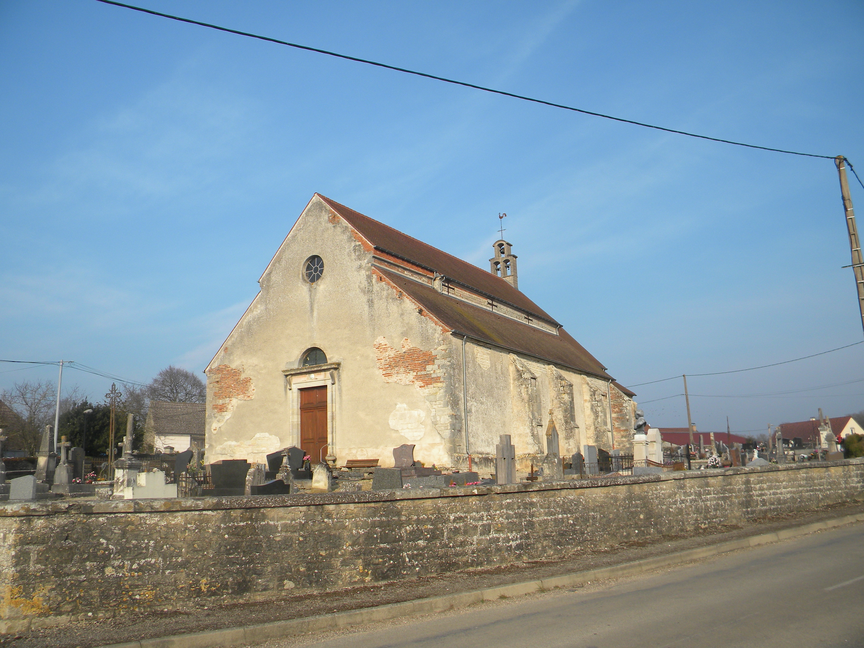 Preĝejo de Premières